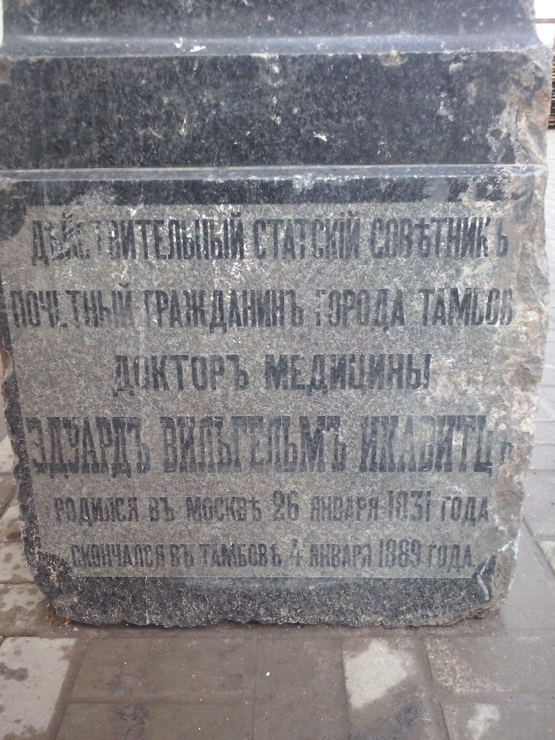 часть надгробия, обнаруженная 20.04.2016 на территории Казанского монастыря (Тамбов) при производстве земляных работ